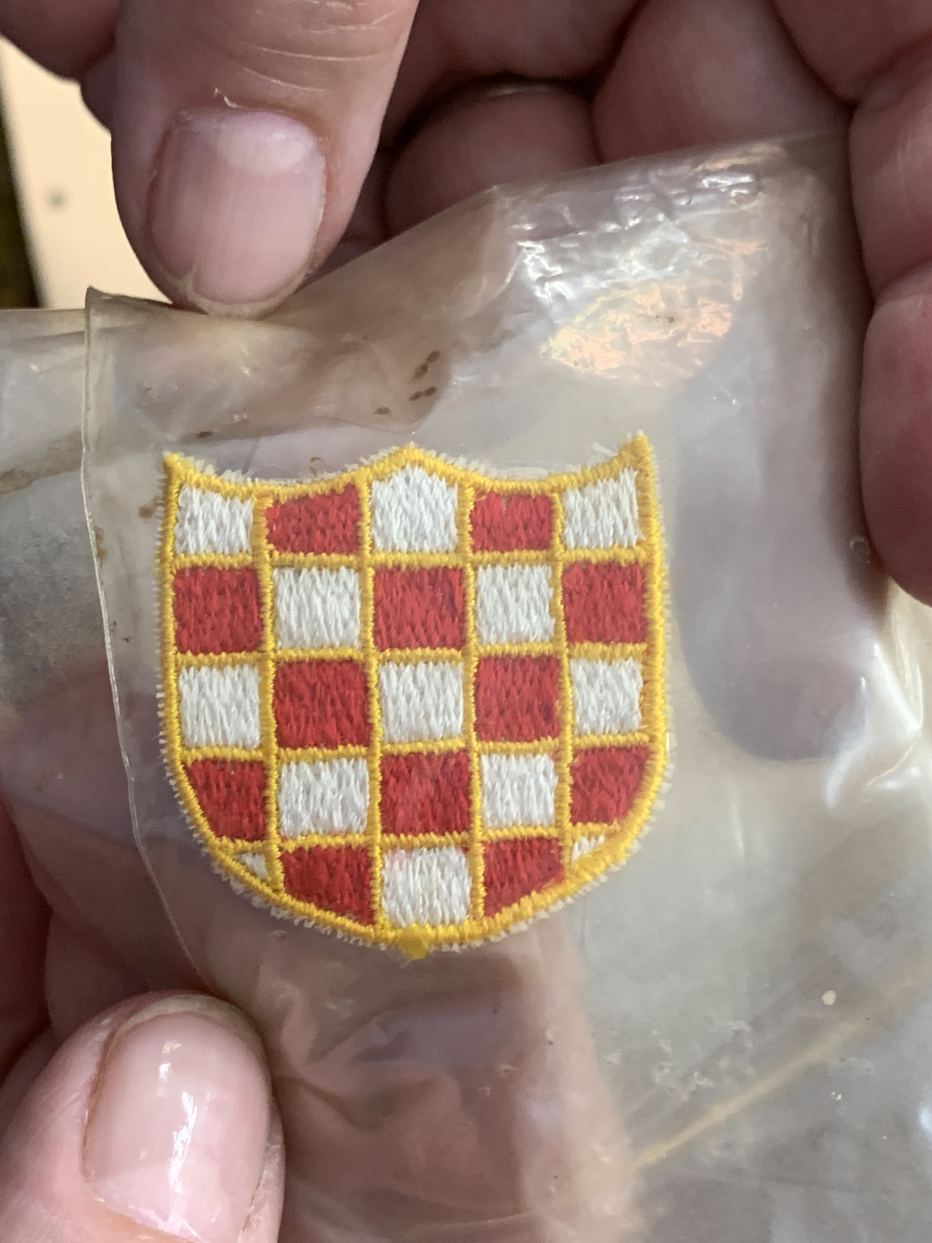 Grb sa prve predsjedničke lente Republike Hrvatske. Prvo polje je bijelo.